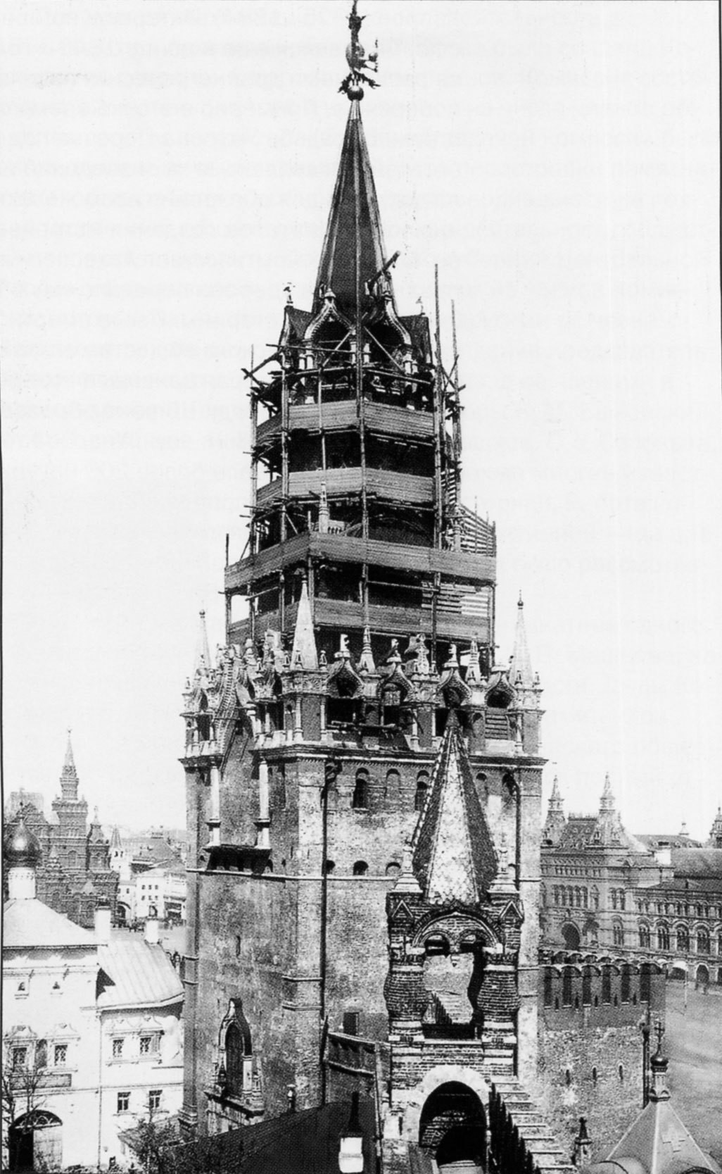 Реставрация Спасской башни в 1912 году.